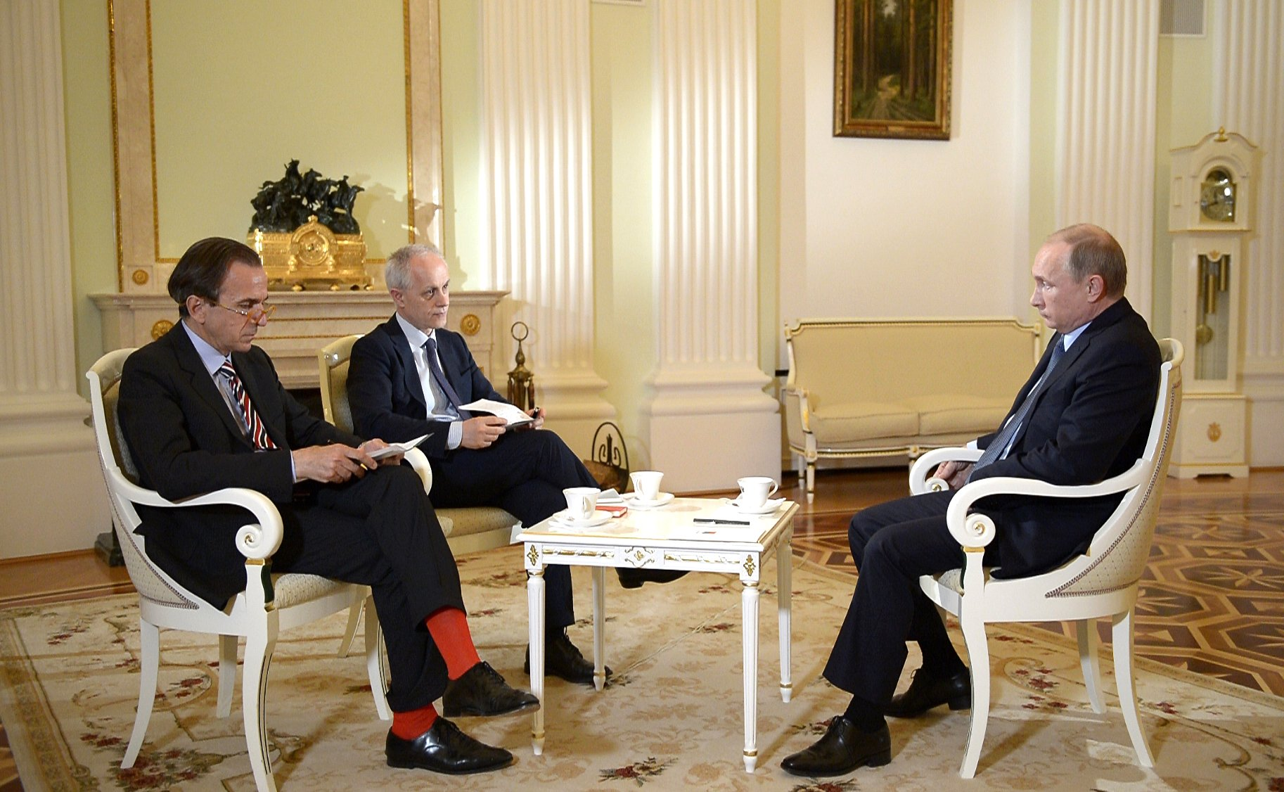 Интервью итальянской газете Il Corriere della Sera.